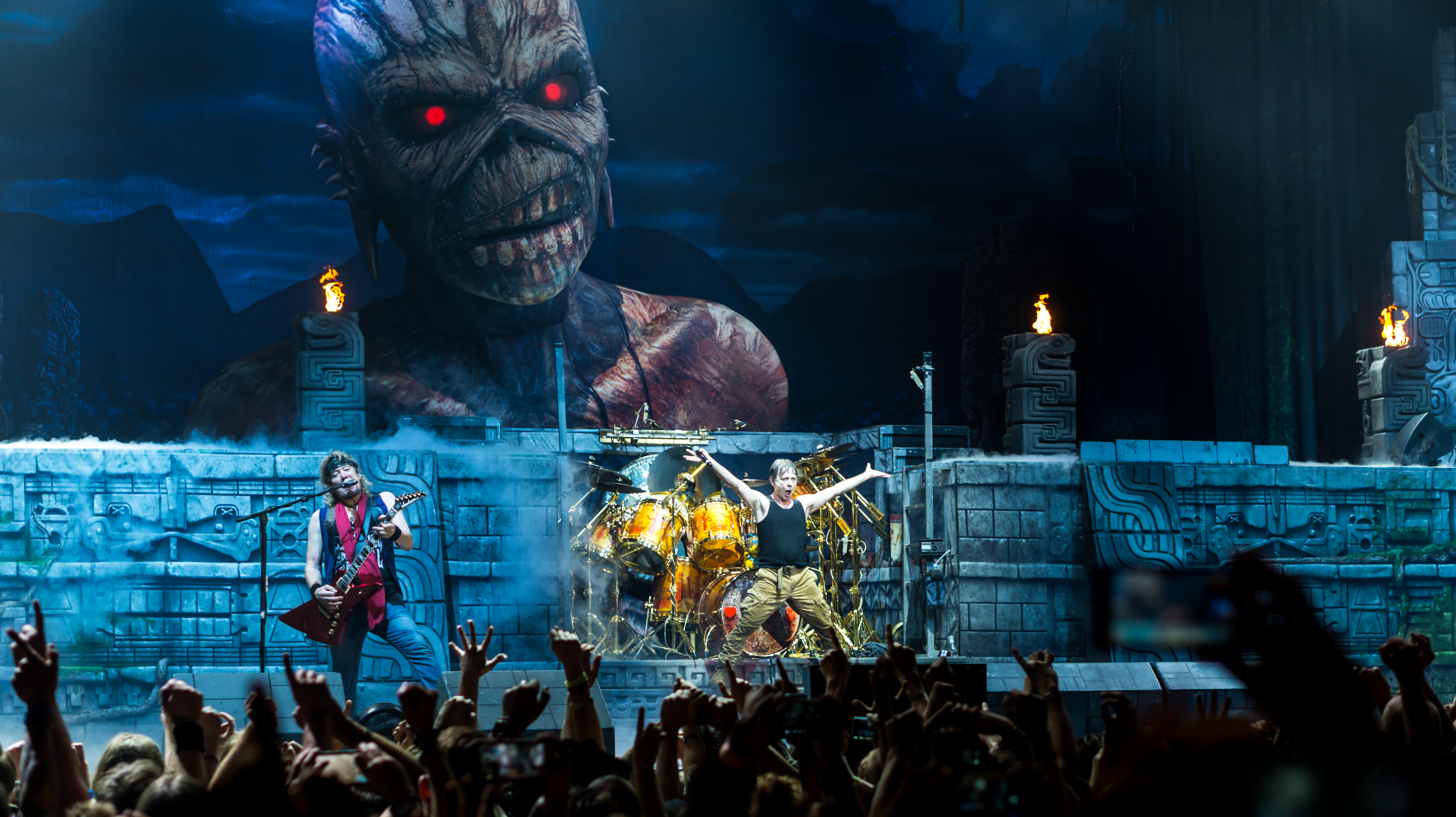 IronMaidenO2_270517-51